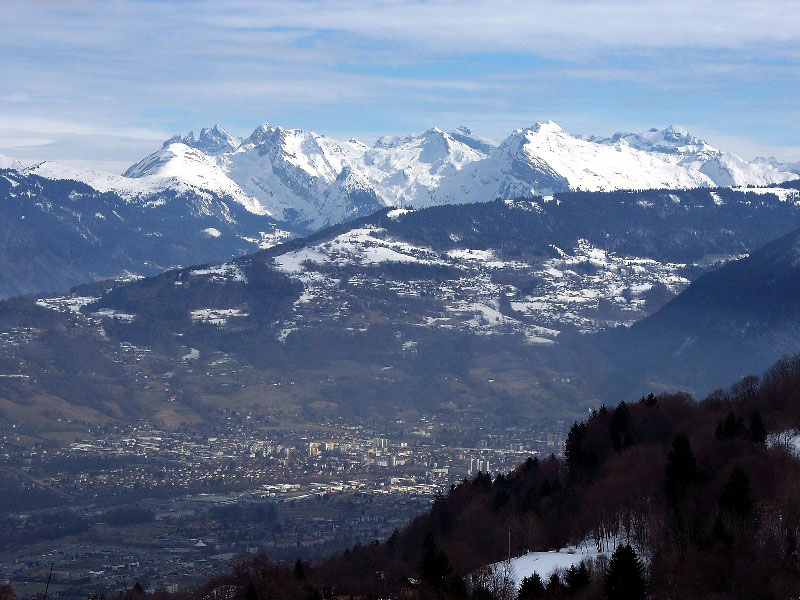 Cluses, dans la vallée de l'Arve, et les montagnes environnantes